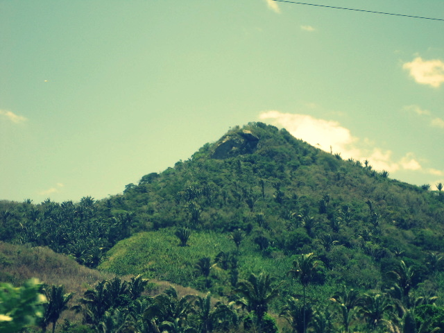 Torre da Lua